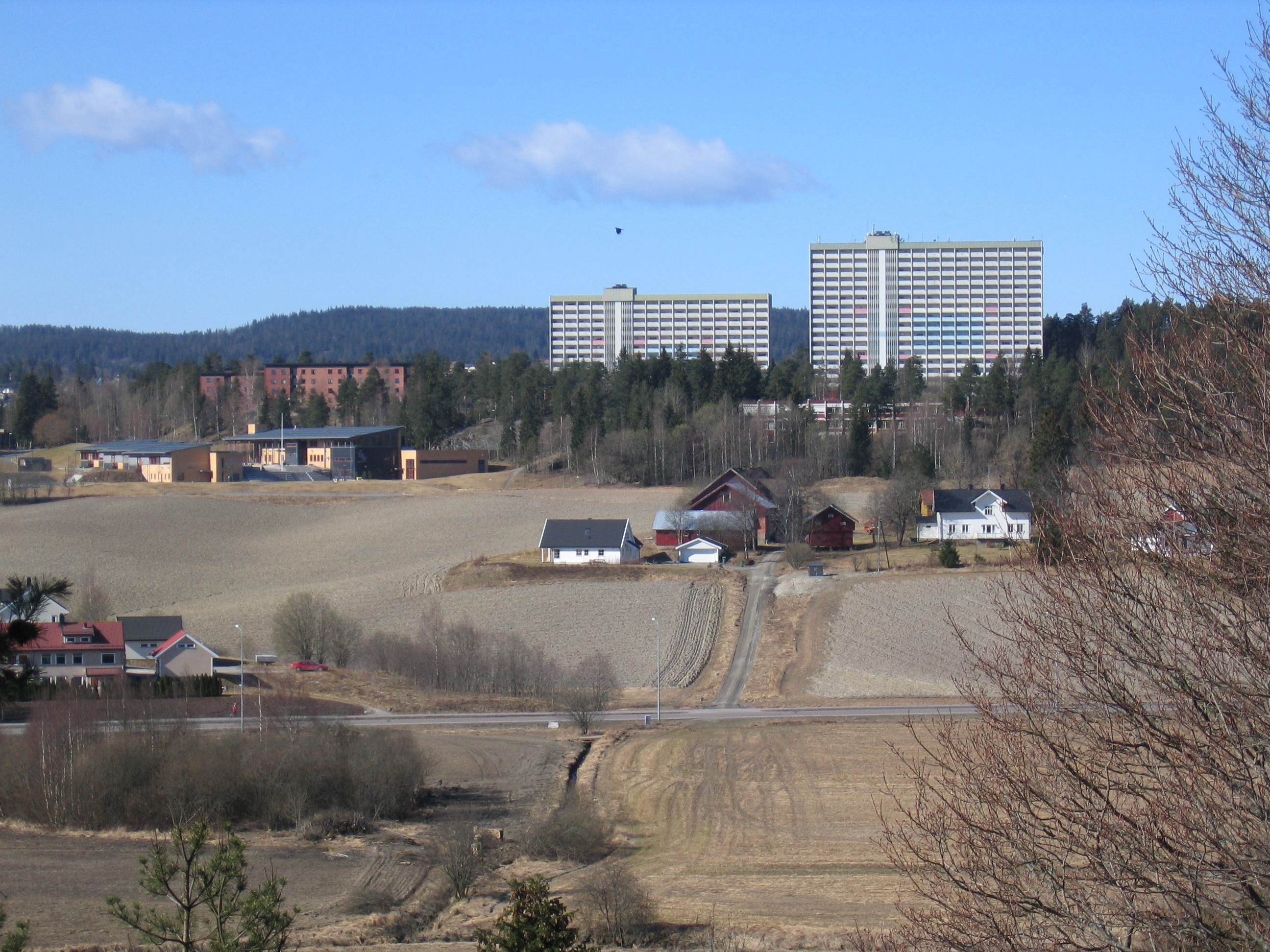 Blokkene på Skåreråsen, sett fra Olavskilden, et dominerende element i landskapsbildet på Lørenskog; synlig på mange kilometers avstand er de ofte til god hjelp om man har mistet retningen under en spasertur.